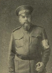 Князь Николай Петрович Урусов во время Первой мировой войны.